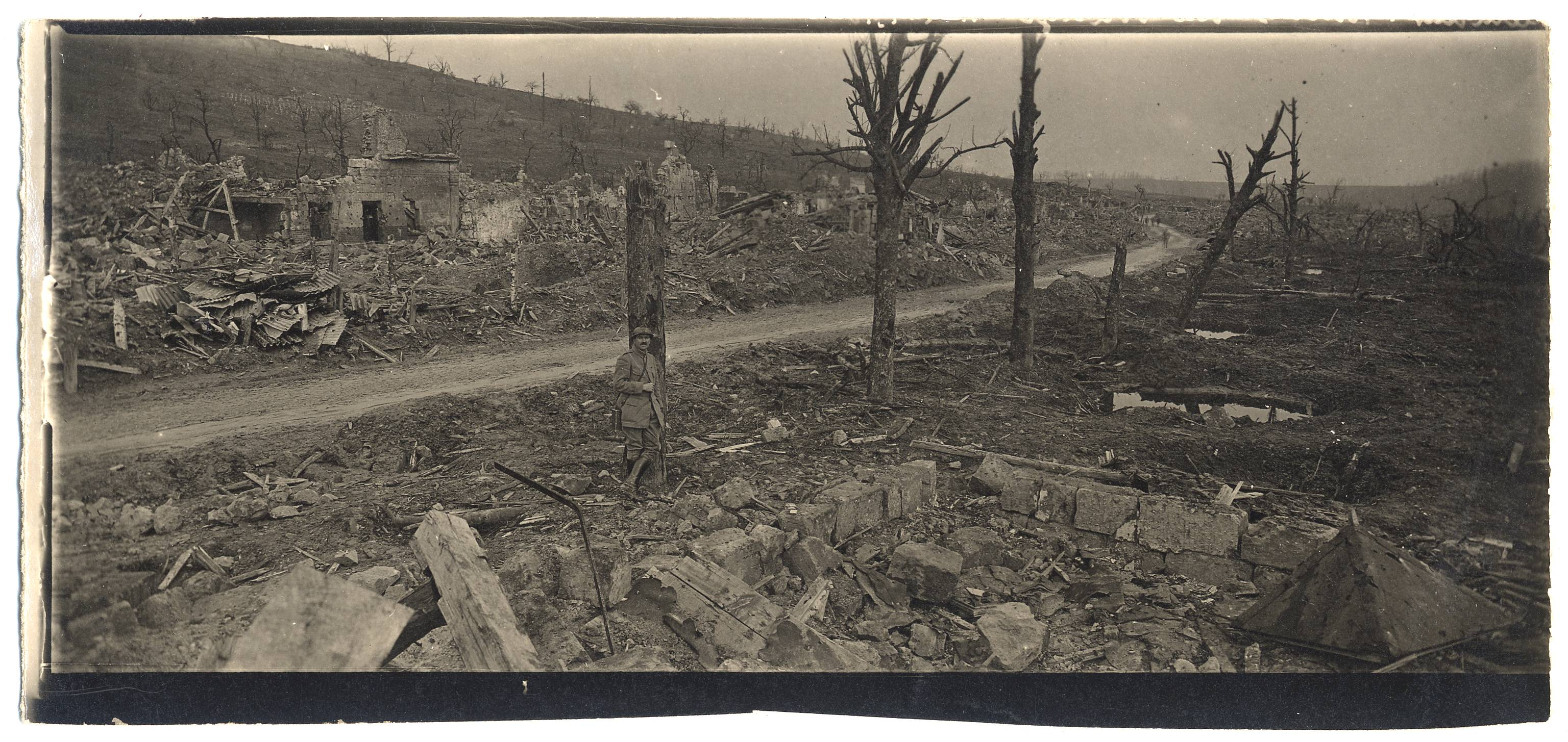 Vue panoramique d'une route au milieu des ruines du village d'Allemant (Aisne). Entre 1914 et 1918. Guerre 1914-1918.